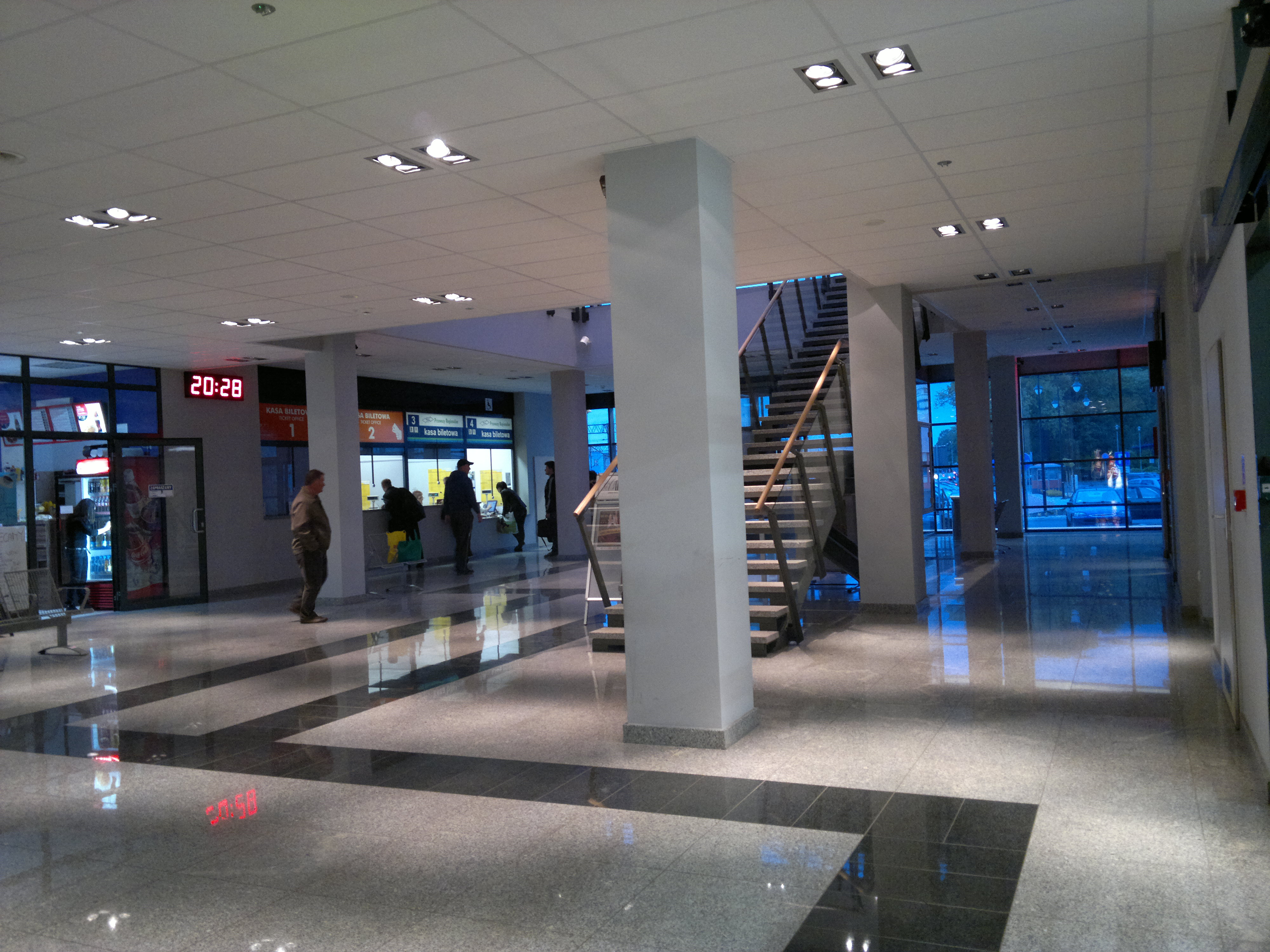 Polska, woj. wielkopolskie, Leszno, Plac przed zmodernizowanym dworcem kolejowym (widok z tarasu budynku)